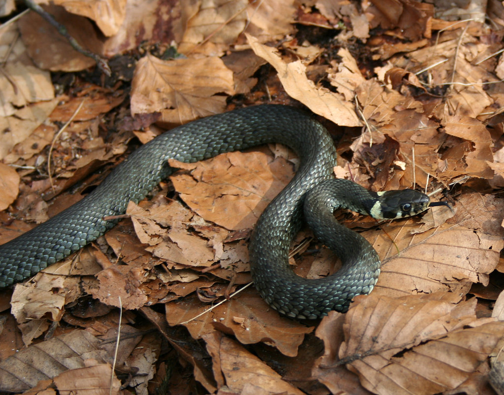 Natrix natrix